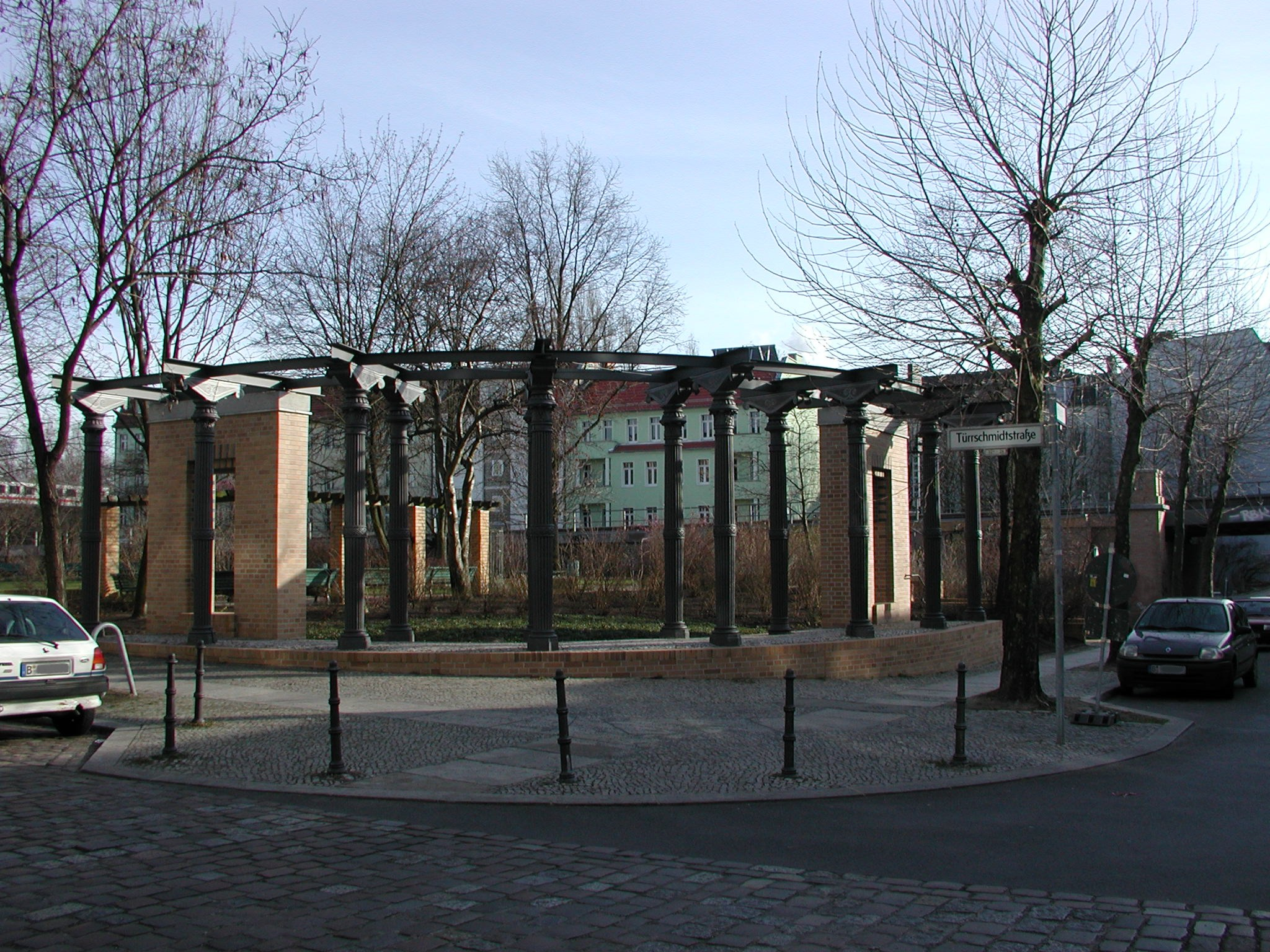 Denkmal "Hartungsche Säulen" der Eisenbahnbrücke über die Stadthausstraße